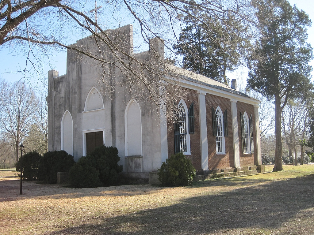 La Grange, Tennessee Immanuel Church